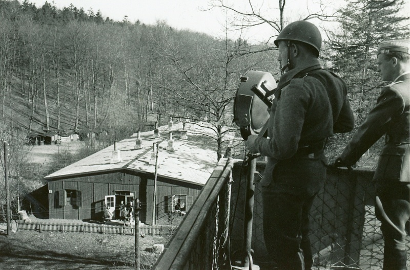 Flygtningelejr ved Thors Mølle, 1946